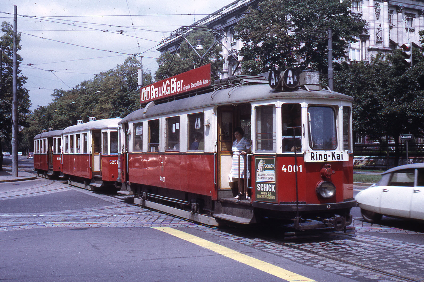 Wien, Ringline AK mit M-m3-m3-Garnitur am Burgring.